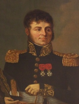 Étienne Félix d'Henin